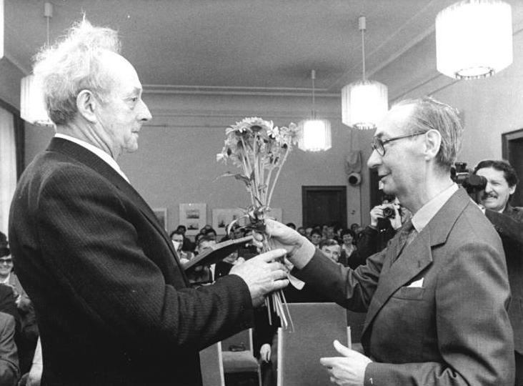 ADN-ZB-Senft-24.4.86-mü-Berlin: Käthe-Kollwitz-Preis verliehen - Mit dem Käthe-Kollwitz-Preis 1986 der Akademie der Künste der DDR wurde der Maler und Grafiker Gerhard Gossmann (l.) in Berlin geehrt. Der 73jährige Fürstenwalder Künstler nahm die Auszeichnung aus den Händen Werner Klemkes (r.), Sekretär der Sektion Bildende Kunst der Akademie entgegen.